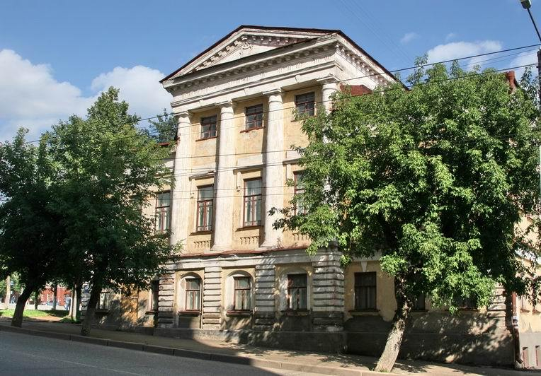 Репинский особняк, построенный в 1815 г. по проекту М. Анисимова